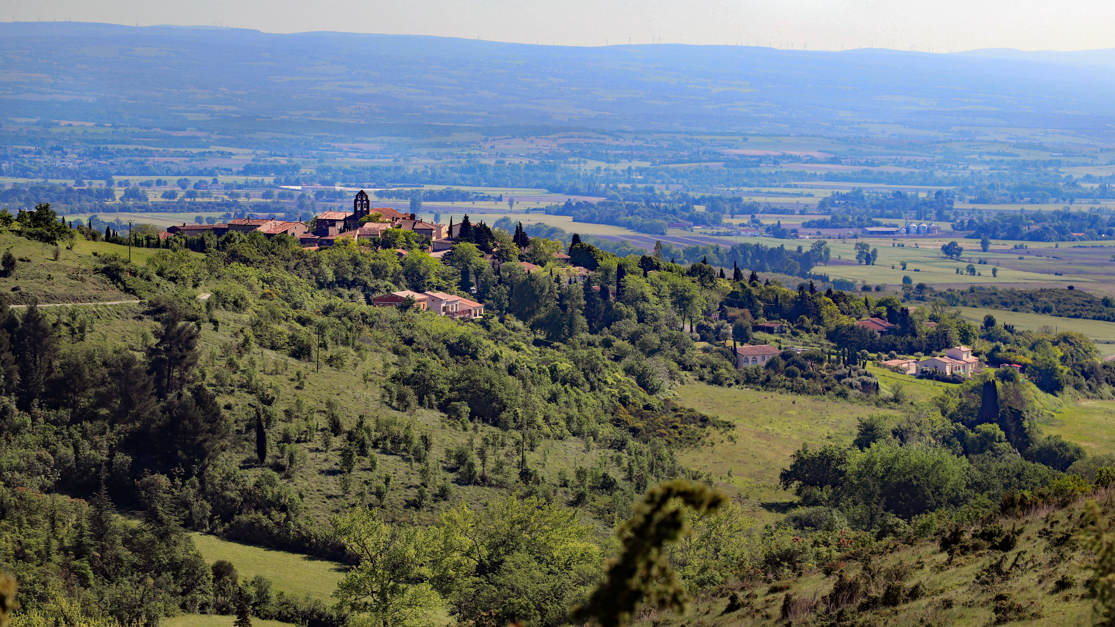 Vue du sud ouest